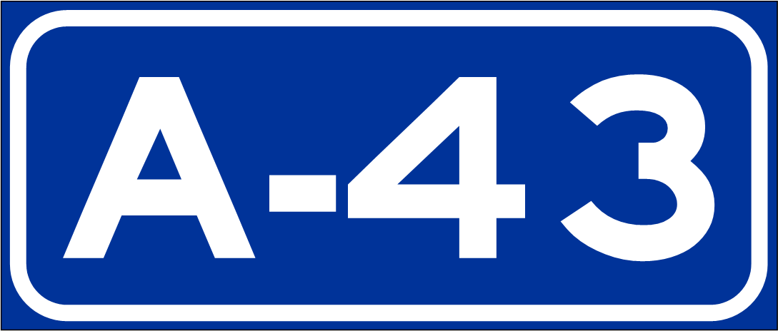 Indicador de la autovia A-43 en España.